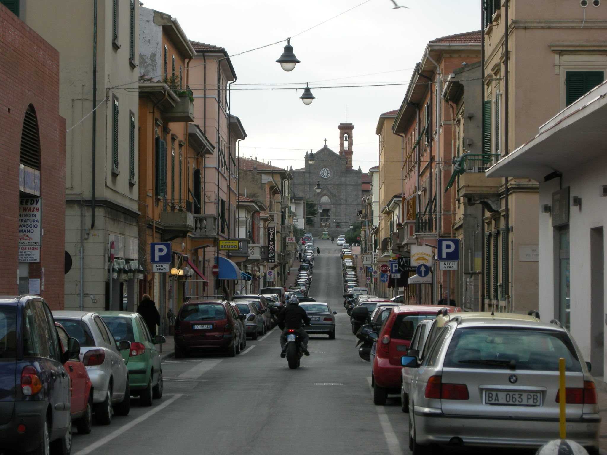 Chiesa dell'Immacolata (Piombino), view